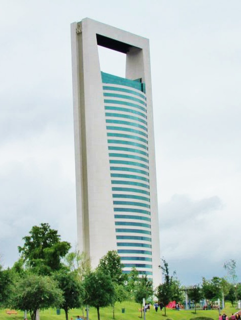 Torre Ciudadana Monterrey 180m.